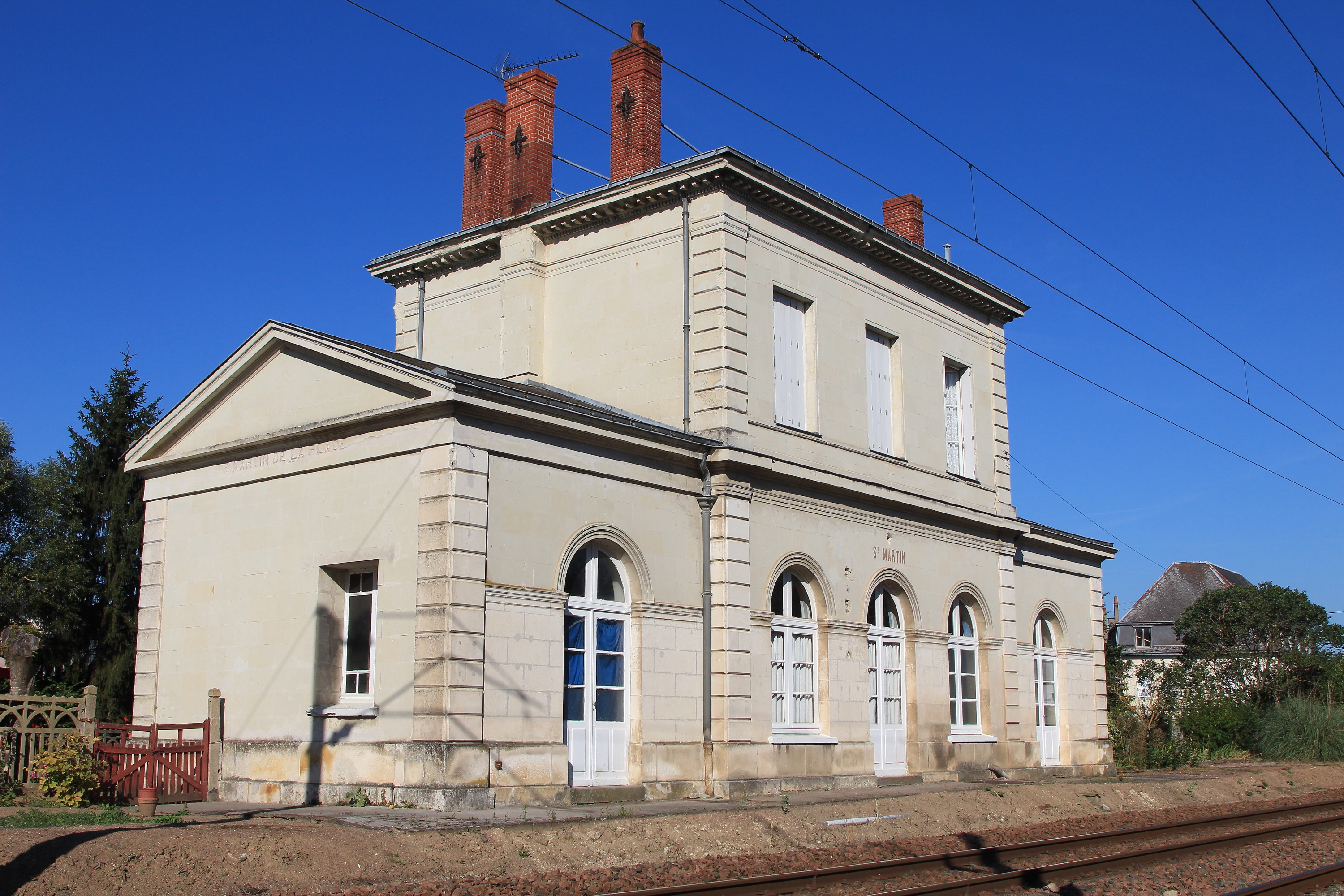 L'ancien bâtiment voyageurs de la gare de Saint-Martin-de-la-Place.